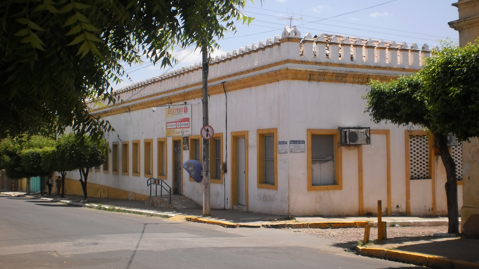 Fachada do antigo Gabinete de Leitura de Barbalha